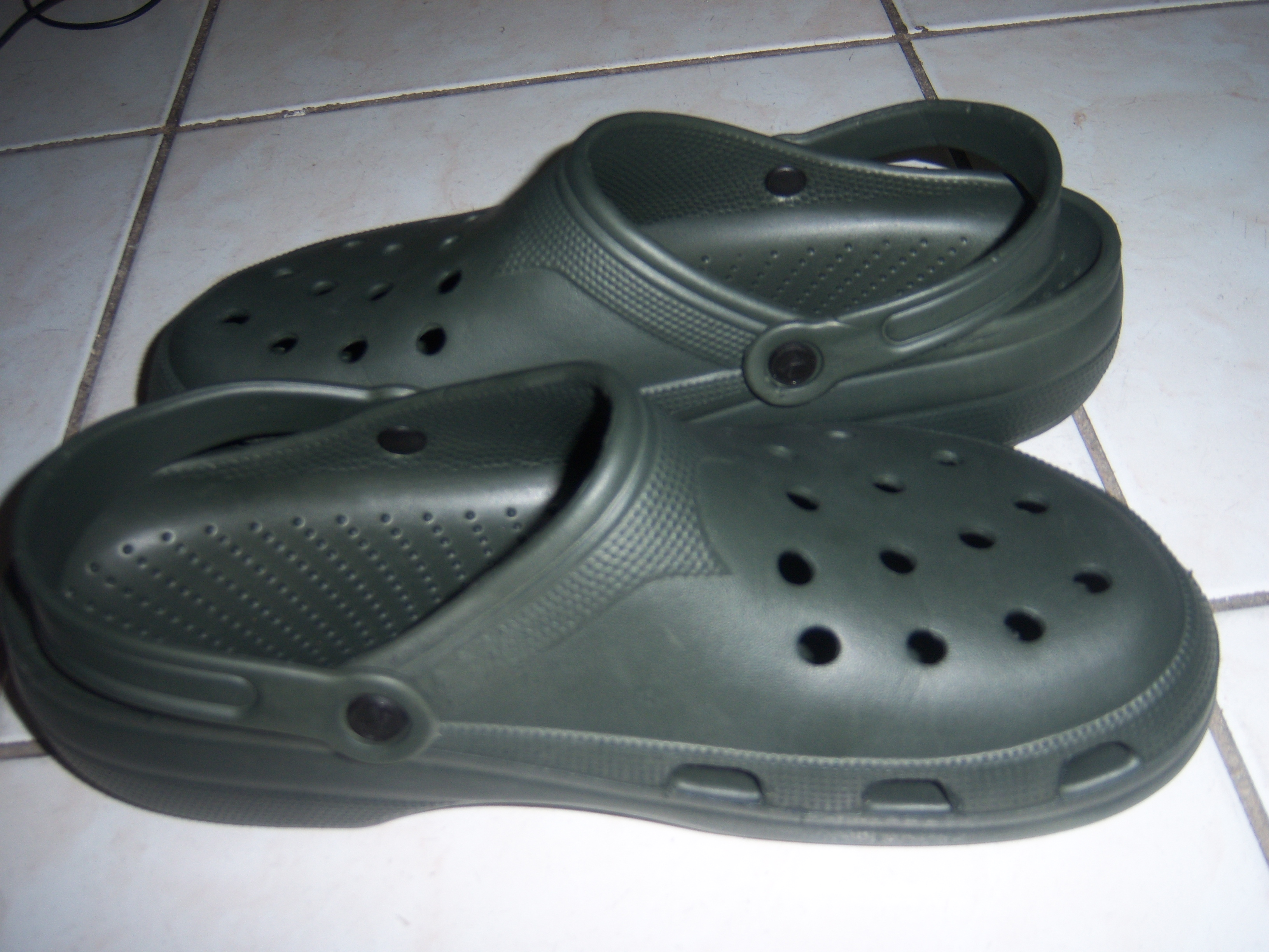 Sandalias (unissex)